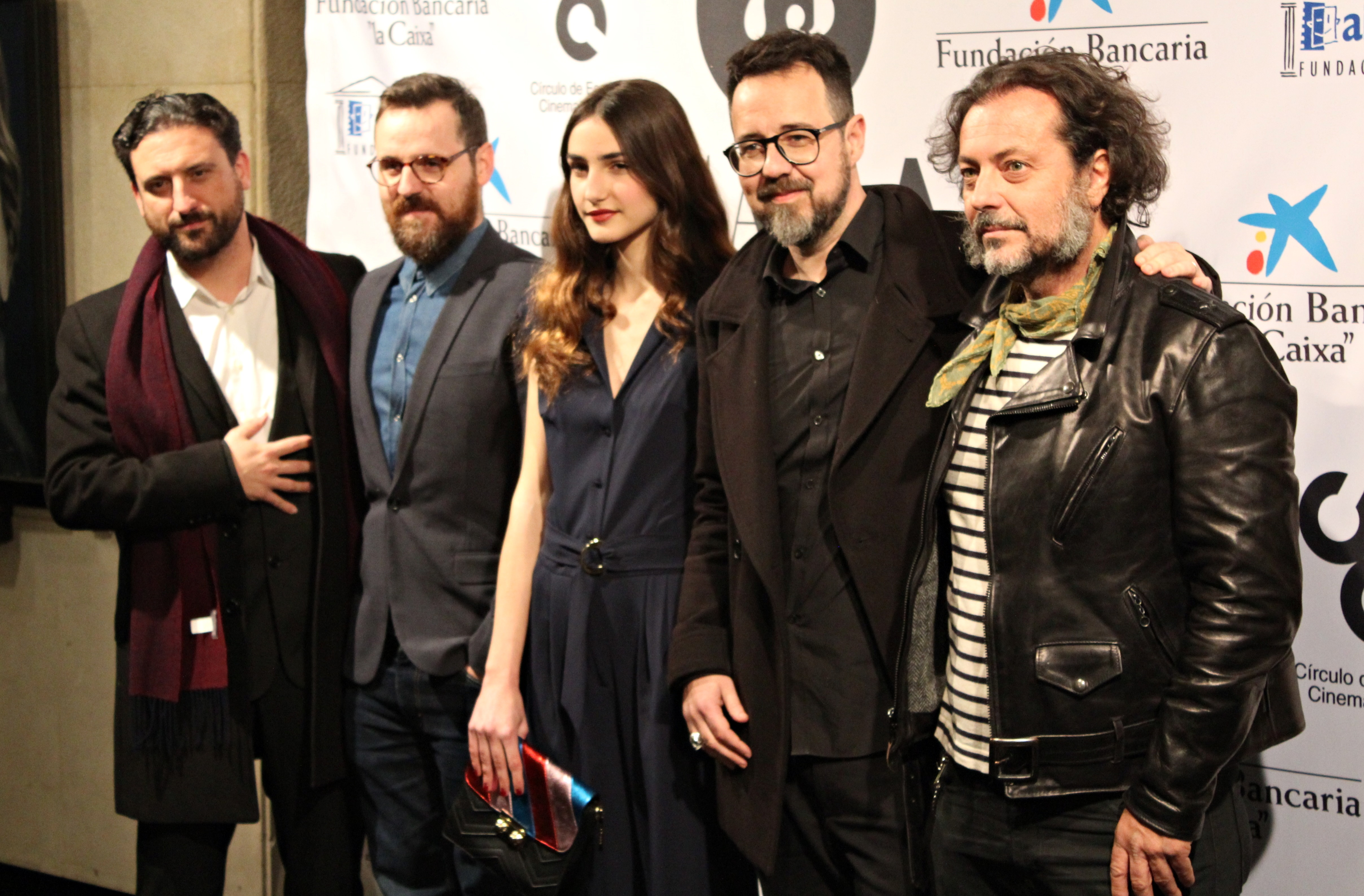 Algunos integrantes del equipo de la película española Verónica en la 73 edición de las Medallas del Círculo de Escritores Cinematográficos. A la izquierda de la imagen, el músico Eugenio Mira; en el centro, la actriz Sandra Escacena; a su izquierda, el director Paco Plaza; y a la izquierda de este, el productor Enrique López Lavigne.